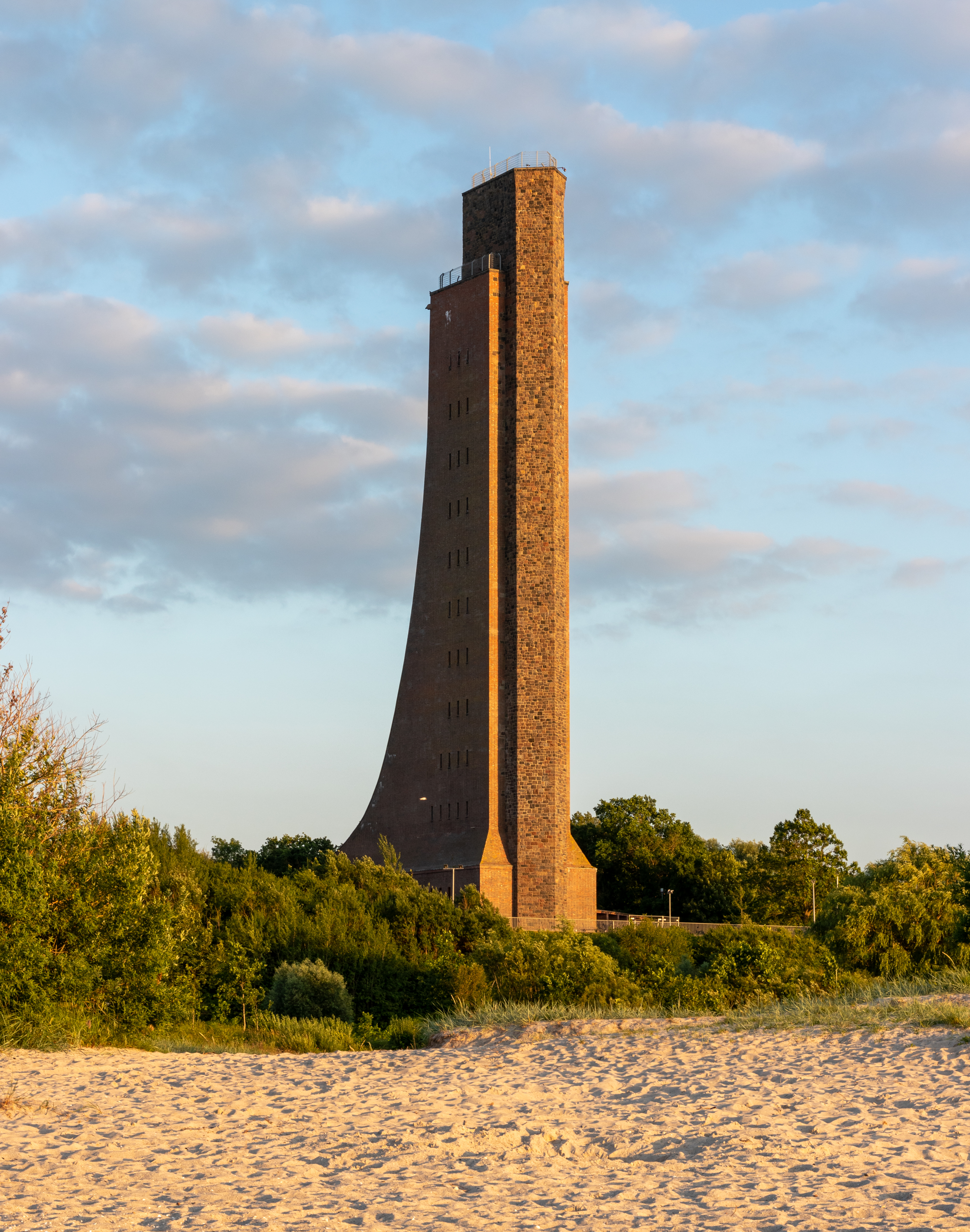 Das Marine-Ehrenmal Laboe